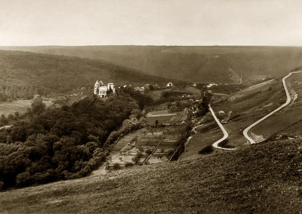 місто Червоногрод, поч. ХХ ст.